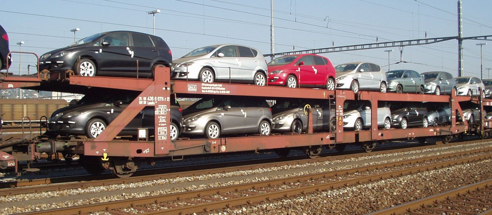 4 achsiger 2 stöckiger Autotransportwagen der Bauart Laaeks 25804366678-7 im Rangierbahnhof Limmattal